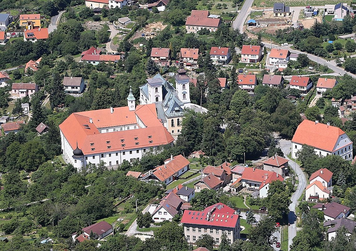 Barokní kostel Narození Panny Marie a klášter ve Vranově u Brna.